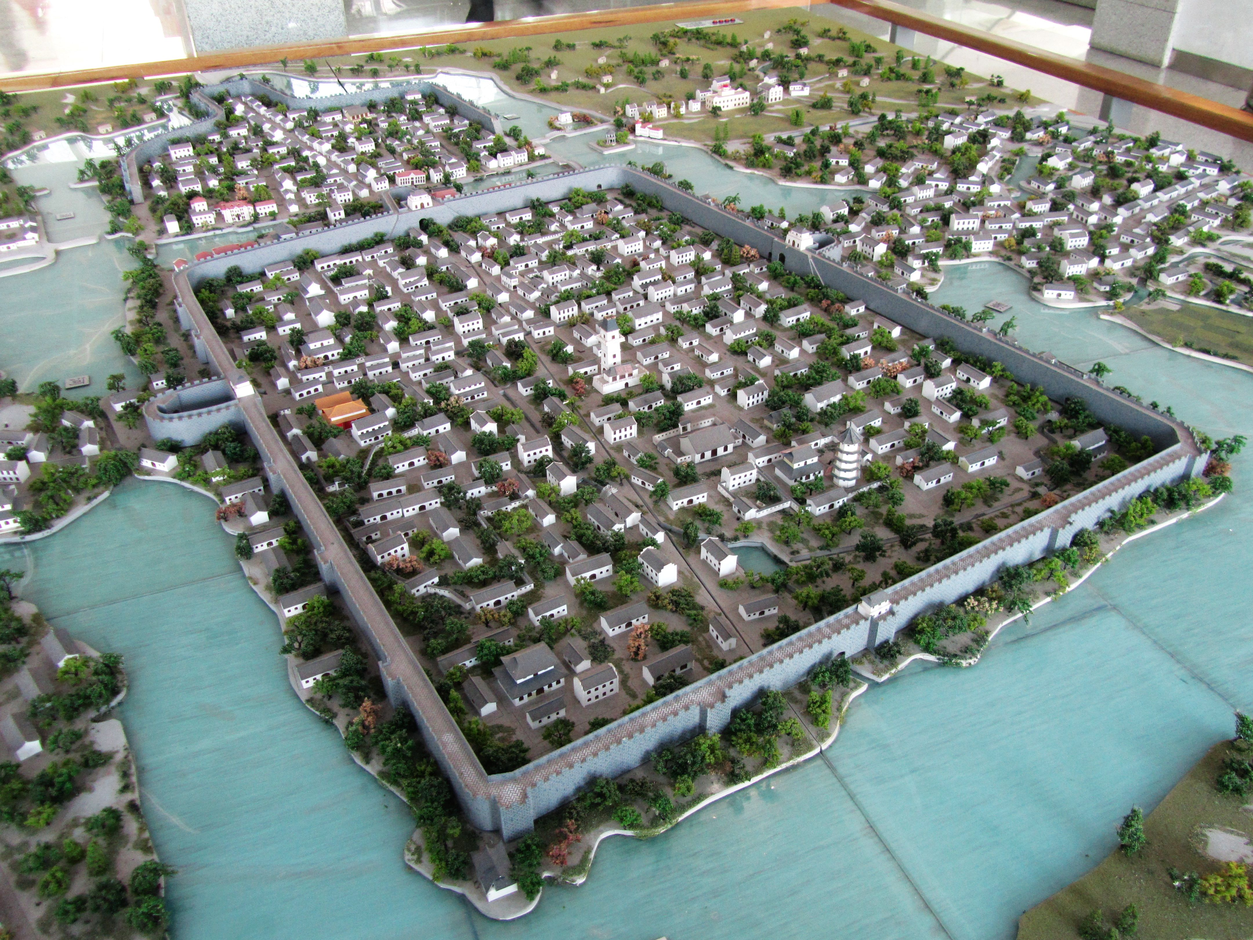 南通博物苑藏南通县城模型。